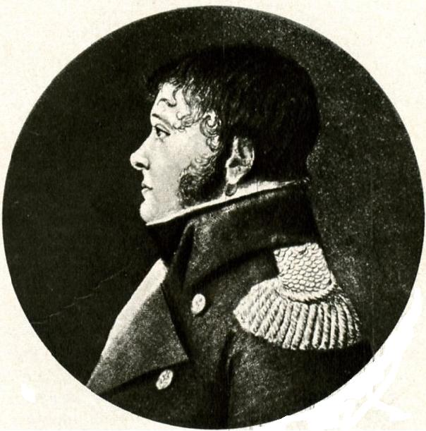 Portrait du Capitaine de vaisseau Renaudin